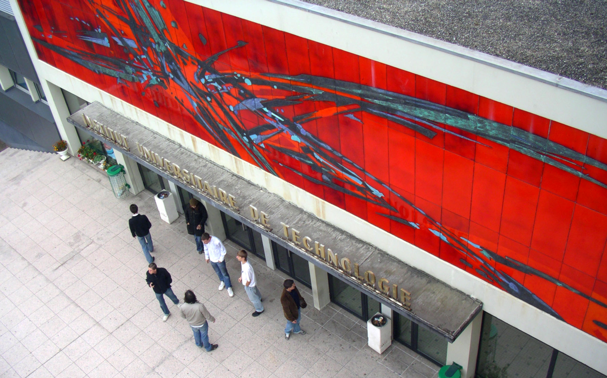 Entrée de l'IUT de Mulhouse, 61 rue Albert Camus, Mulhouse